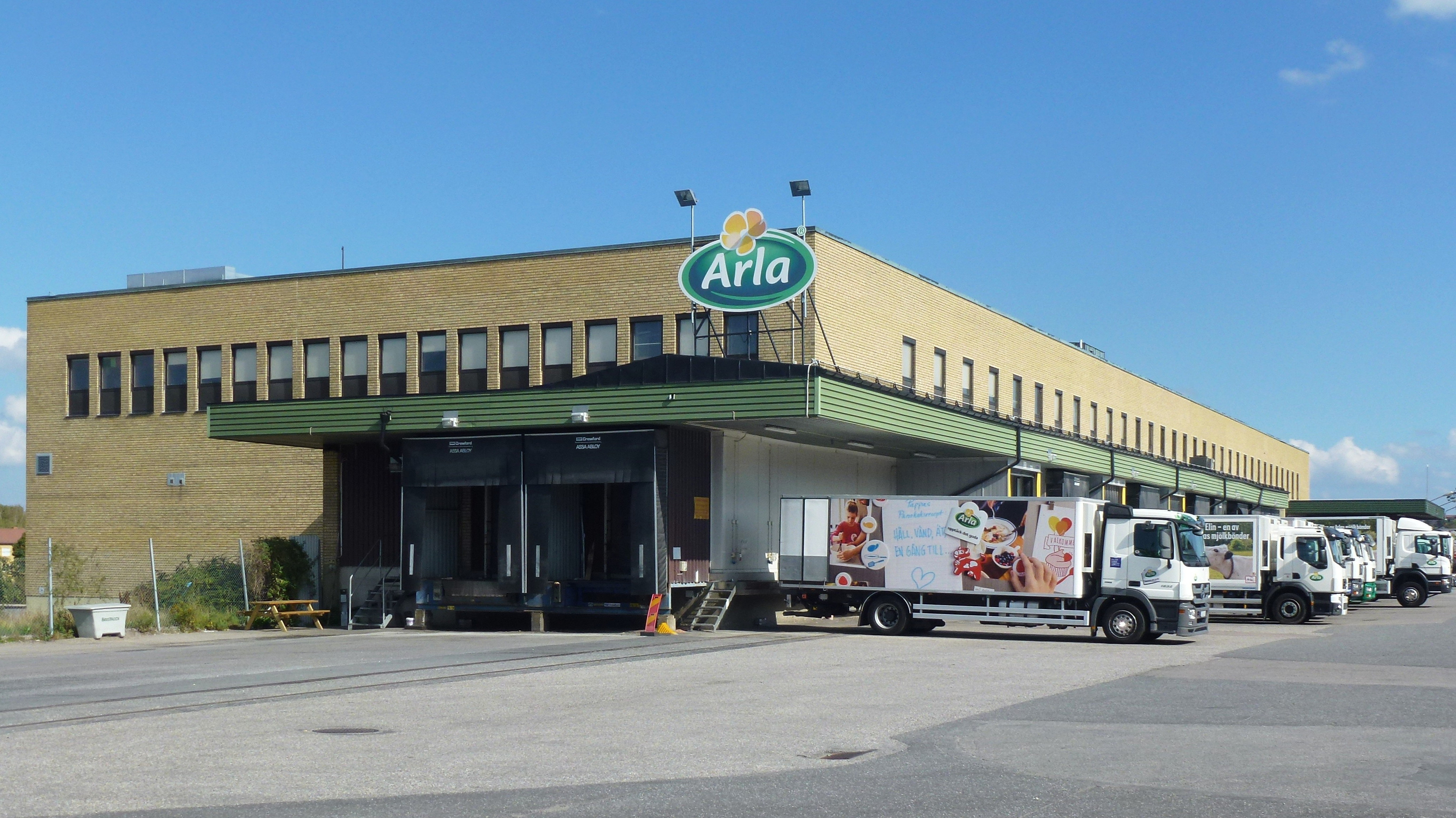 Lagerhallen 2, arkitekt Elmer Husman